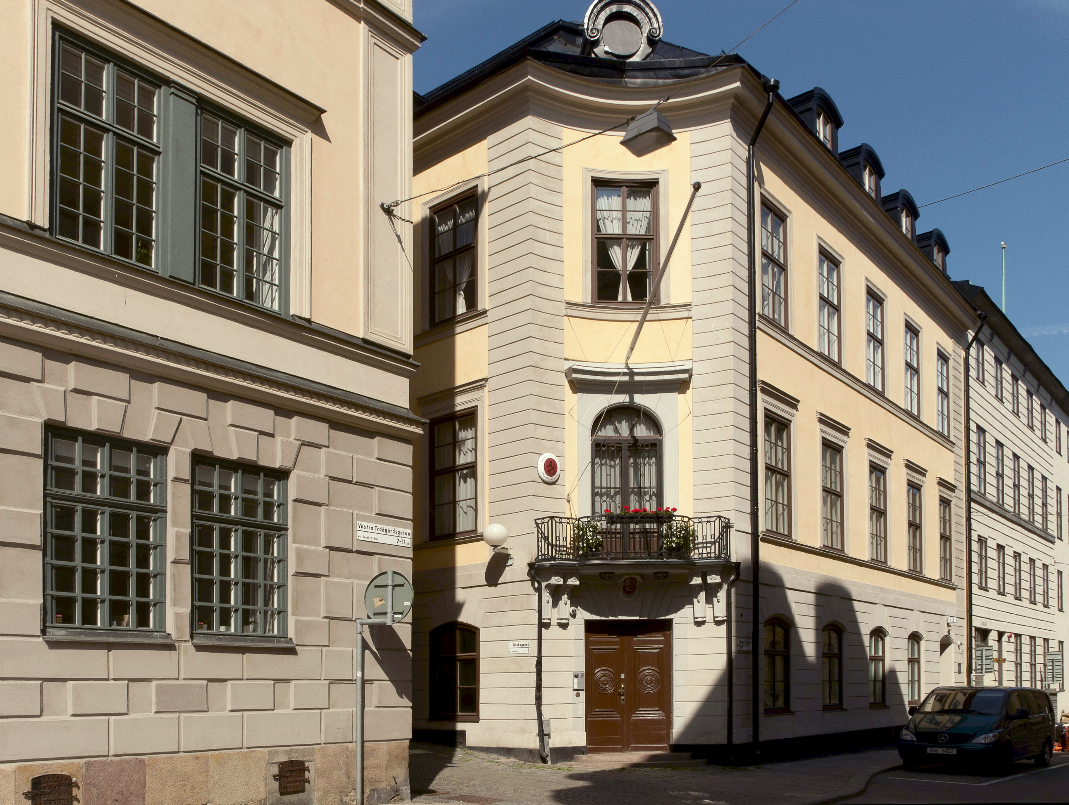 Wachtmeisterska huset, Västra Trädgårdsgatan 13. Byggnadsåcra 1769-74, arkitekt J E Rehn, byggherre C De Geer.